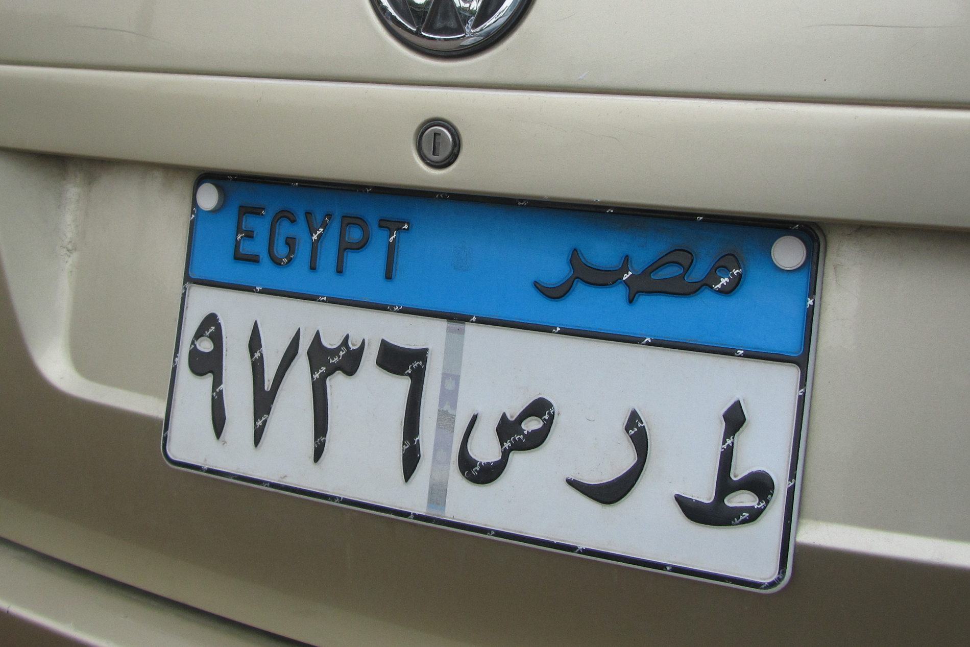 Egypte El Gouna november 2012